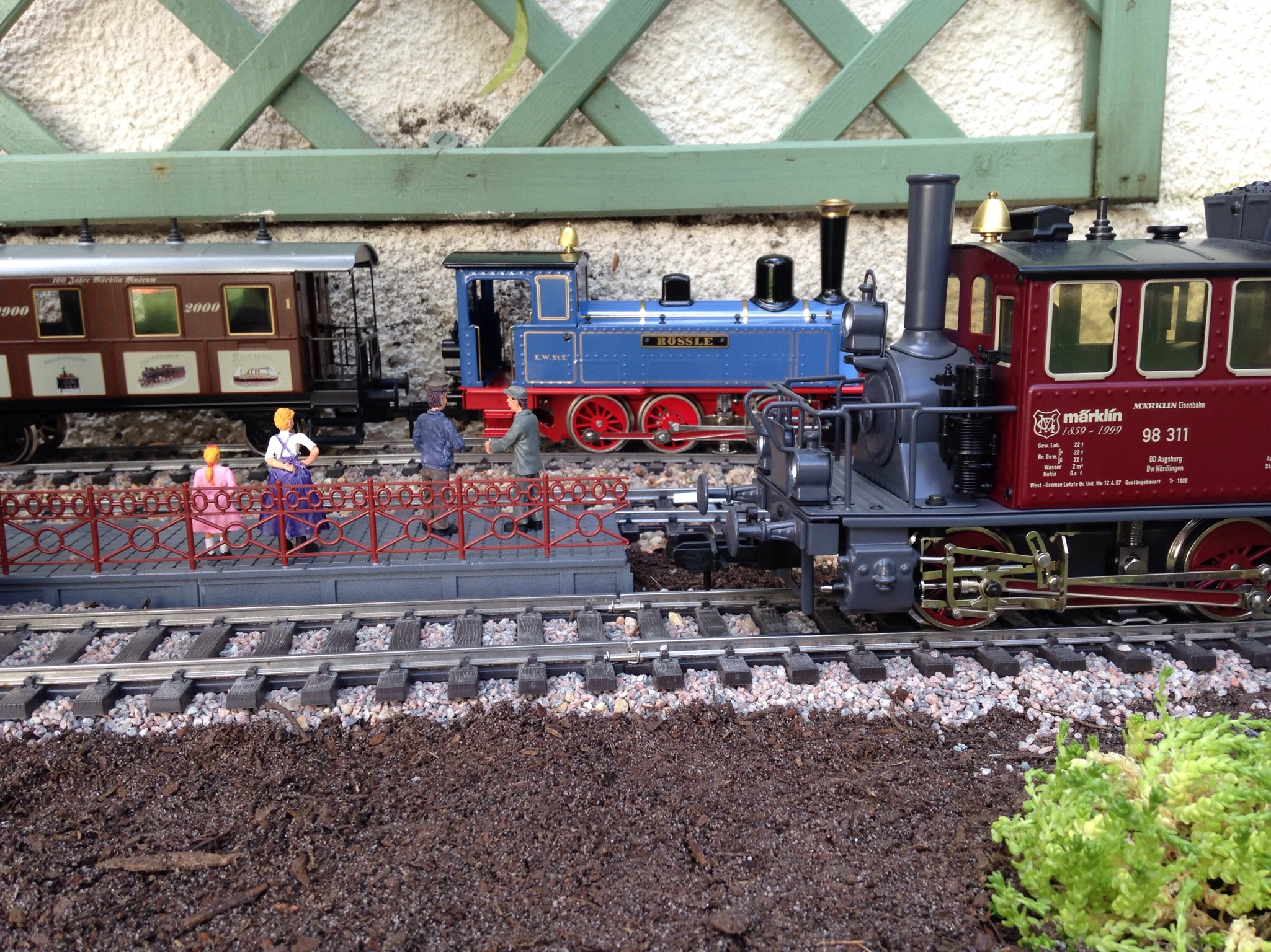 Märklin Maxi T3 lok und Glaskasten